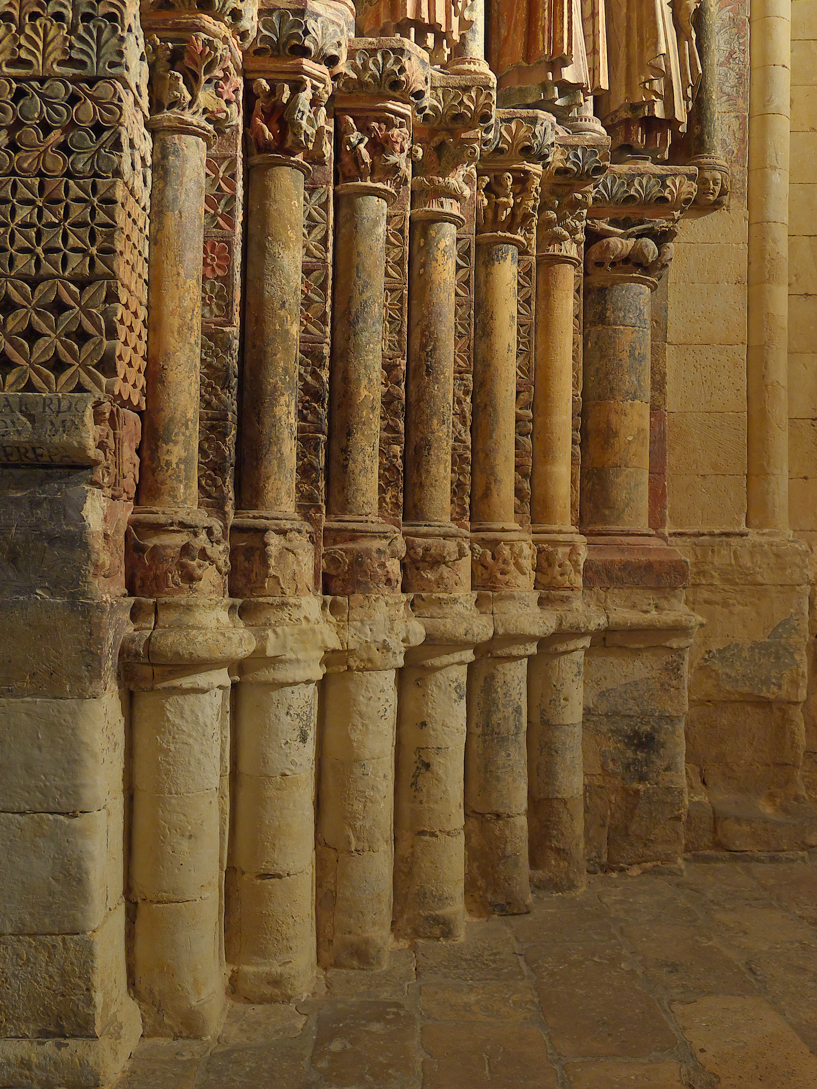 La fase inicial constructiva corresponde a un maestro románico, probablemente con bastante experiencia, con un proyecto original y ambicioso, planteado en el segundo cuarto del XIII. Este desarrollo quedó paralizado, conservándose, afortunadamente, su comienzo. El único referente válido lo encontramos en la portada occidental de la Basílica de San Vicente (Ávila).